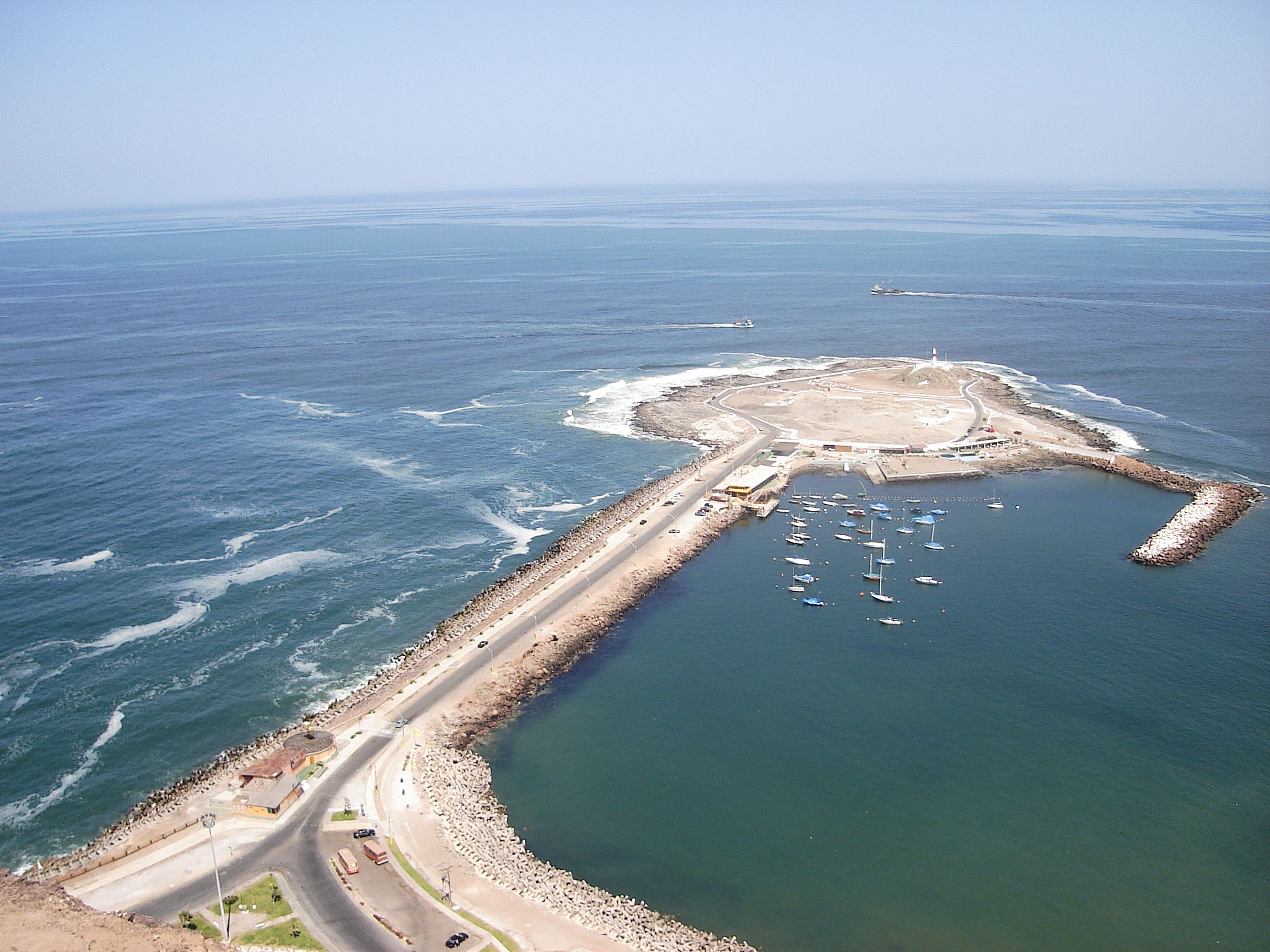 Foto tirada por mim, em Arica.